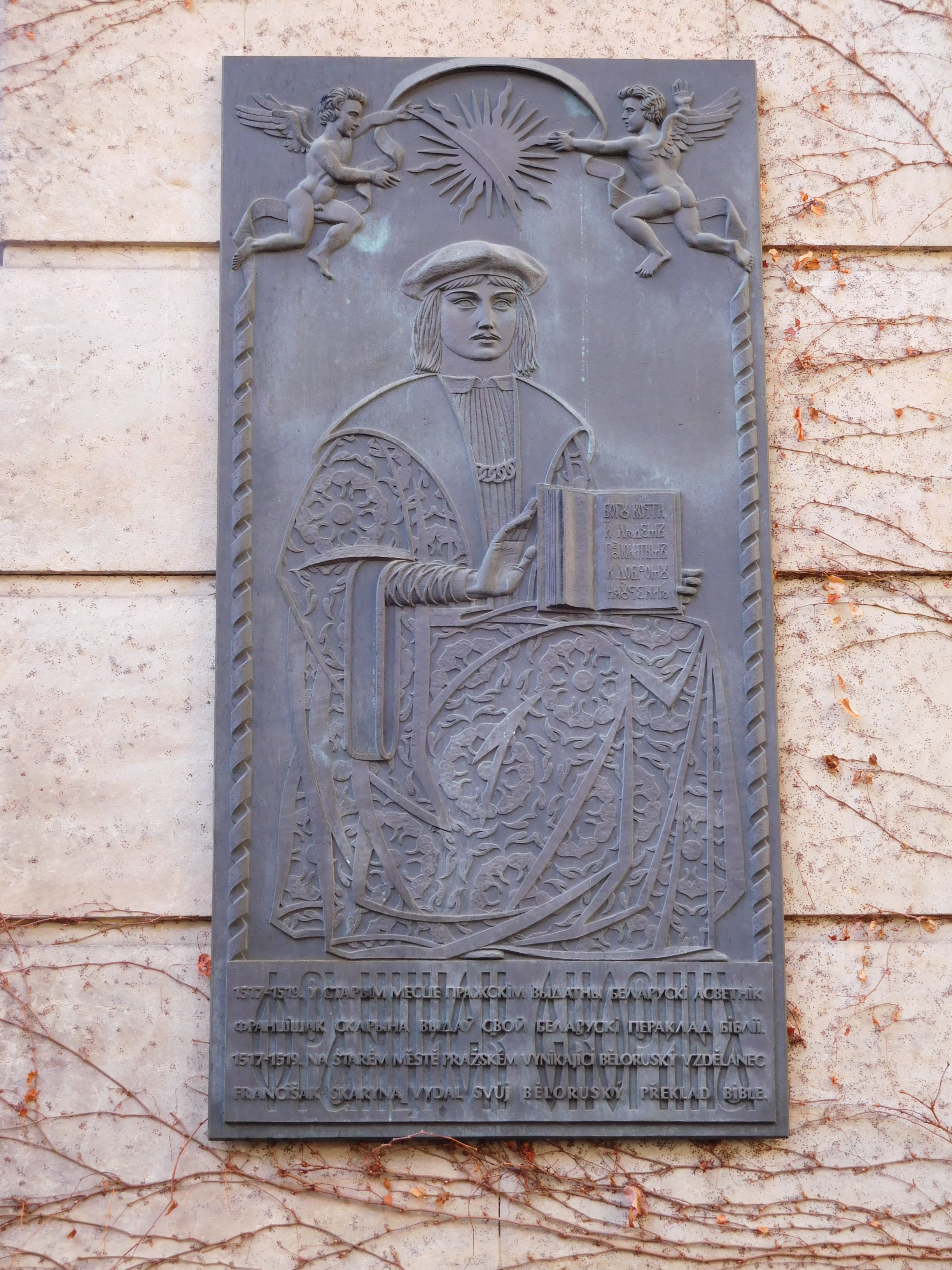 Praha - Staré Město, Klementinum - pamětní deska Francišaka Skaryny